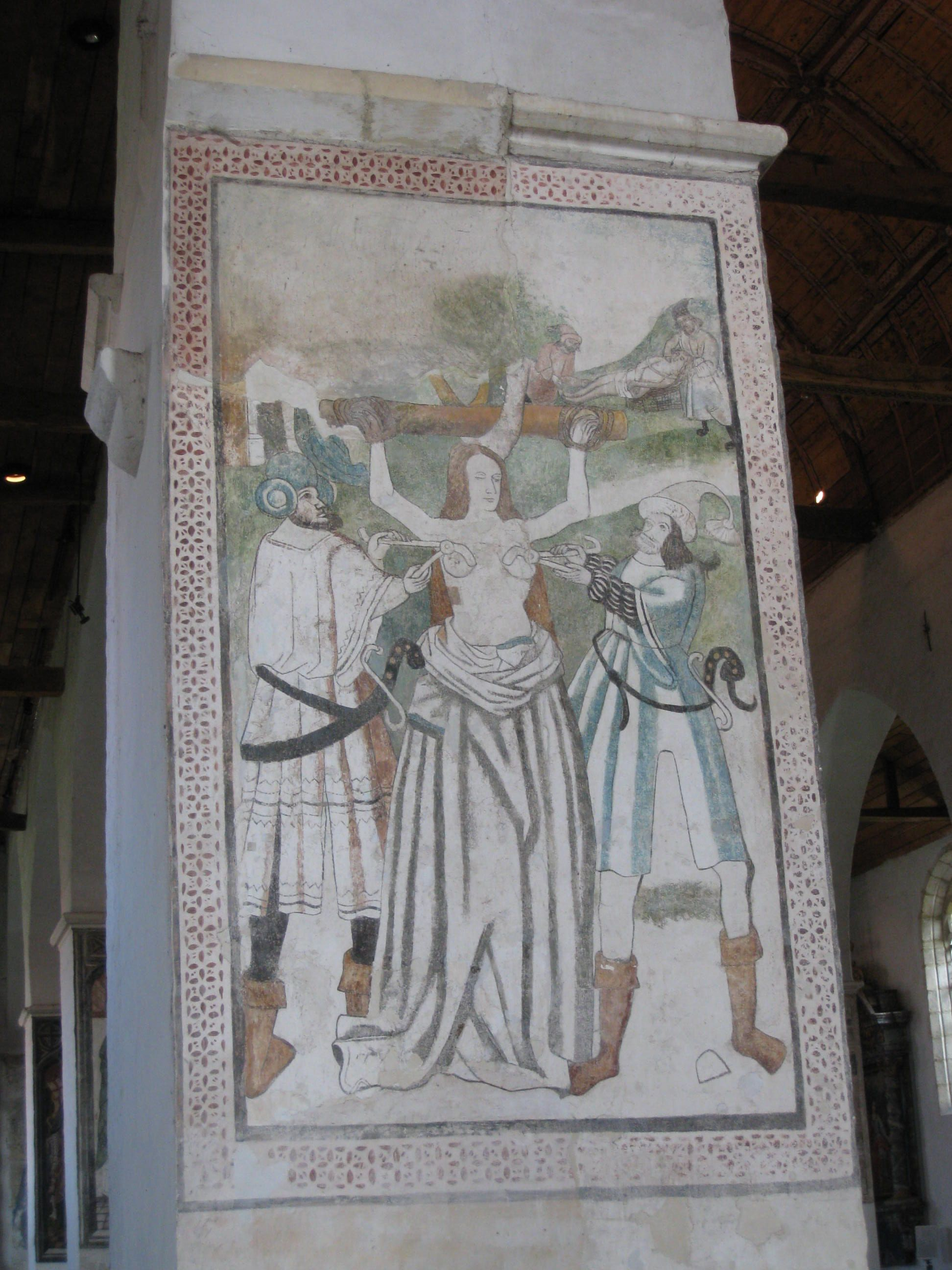 Marteldood H. Agnes, fresco uit begijnhofkerk Sint-Truiden